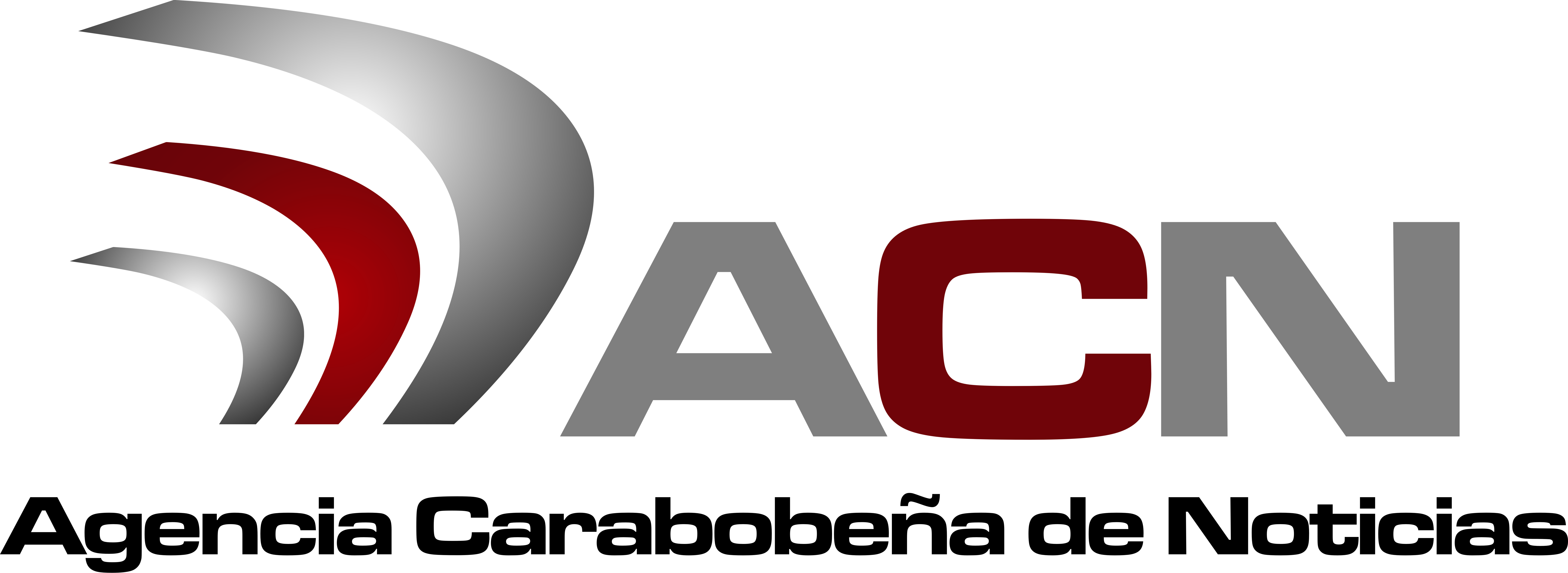 Logotipo de la Agencia Carabobeña de Noticias ACN